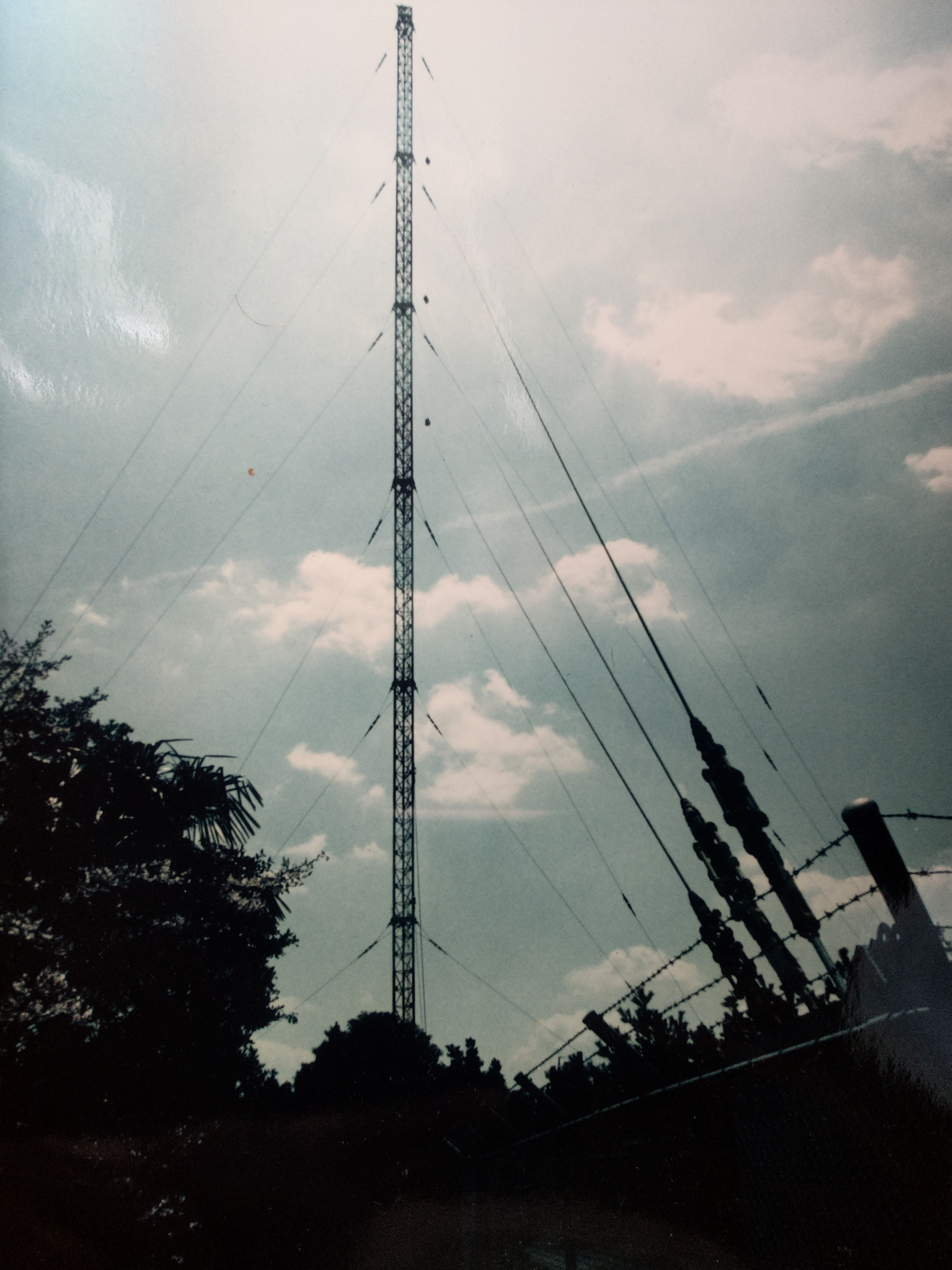 愛知県小垣江 依佐美送信所